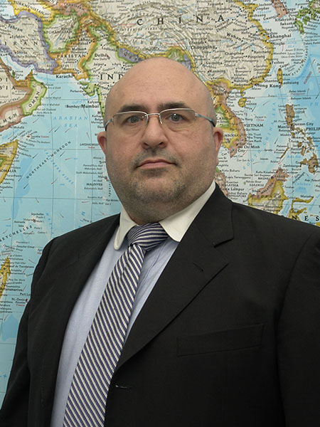 David R.Vidal en su oficina